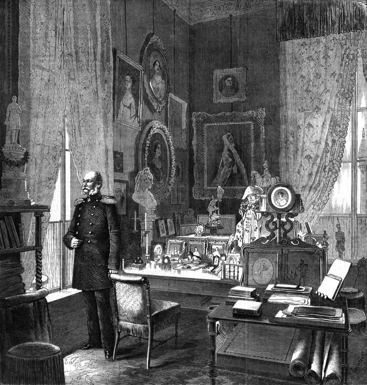 König Wilhelm I. von Preußen in seinem Arbeitskabinett im Kgl. Palais in Berlin, 1868.